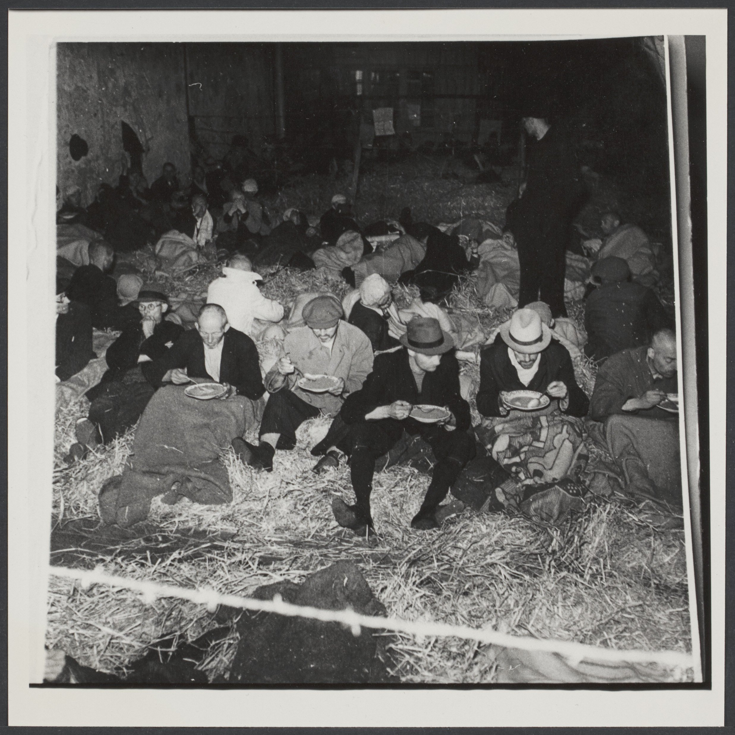 Collectie / Archief : Fotocollectie Spaarnestad Onderwerpen Reportage / Serie : Collaboratie Nederland. Beschrijving : Interneringskamp Levantkade te Amsterdam. Mannenafdeling Locatie : Nederland Trefwoorden : oorlogen, oorlog Fotograaf : Breijer, Charles / Anefo Auteursrechthebbende : Nationaal Archief Materiaalsoort : Foto (zwart/wit) Nummer archiefinventaris : bekijk toegang 7.000SPAond Inventarisnummer : 31017 Bestanddeelnummer : 31017_094